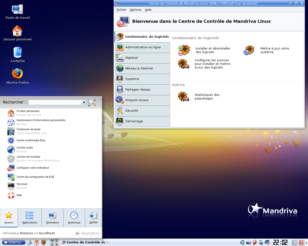 Mandriva 2008.1 (Spring) sous KDE 3.5.9